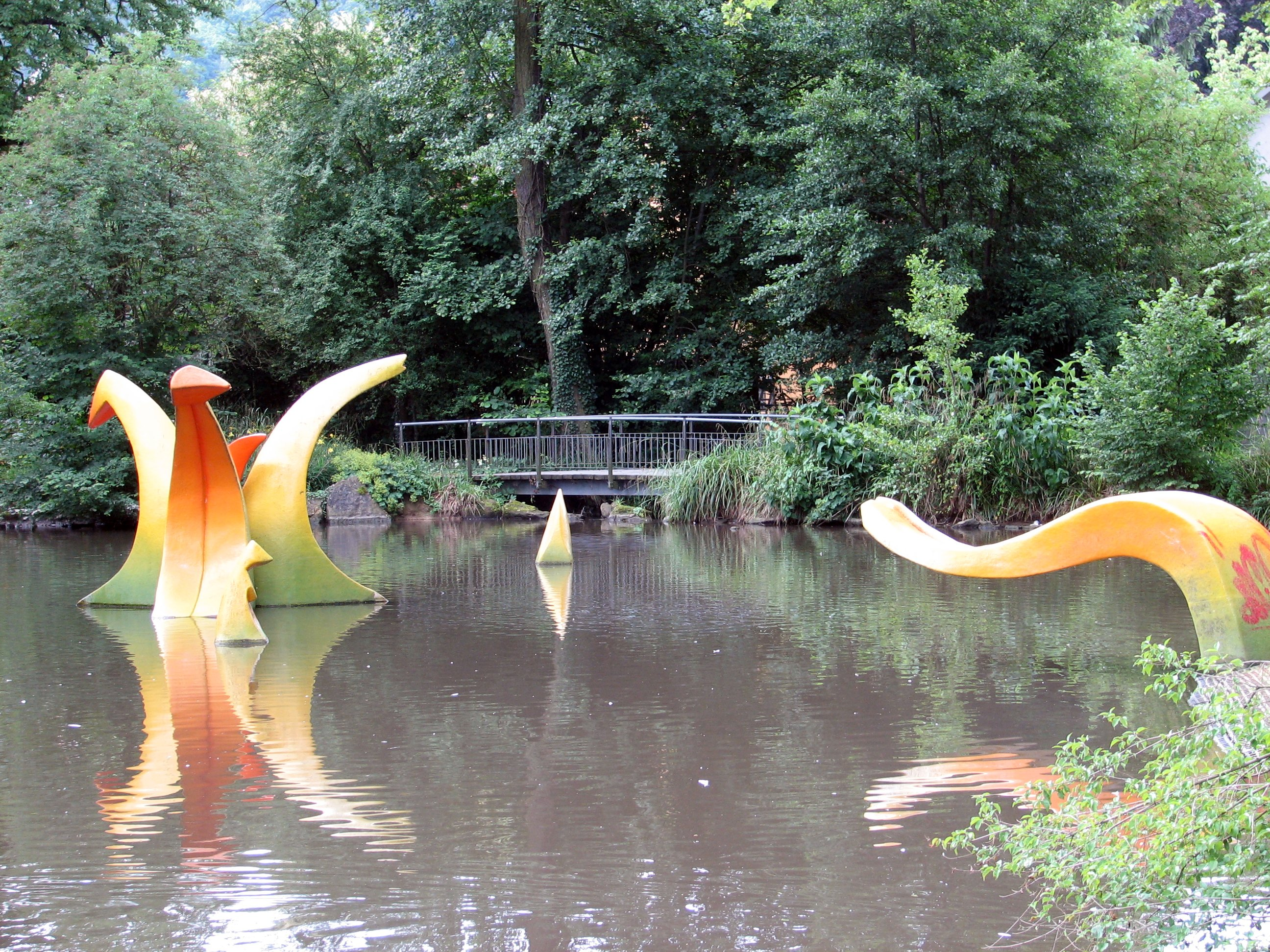 Part of the Landesgartenschau park in Mosbach